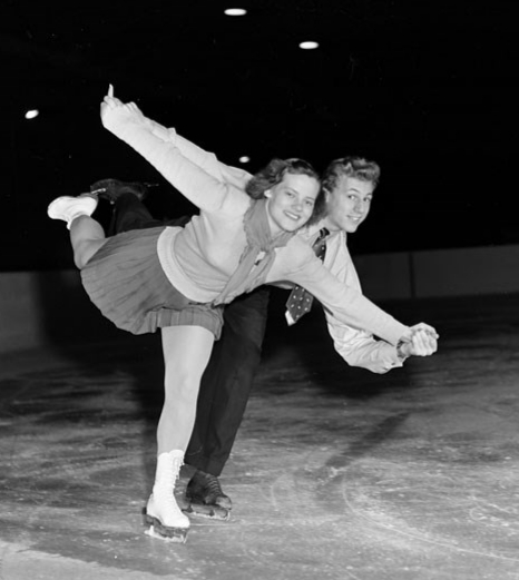 Berit Andersson och Torgil Rosenberg, bild från Stockholms stadsmuseum, Fotograf John Kjellström, Fotonummer SvD 27274, 1 november 1950